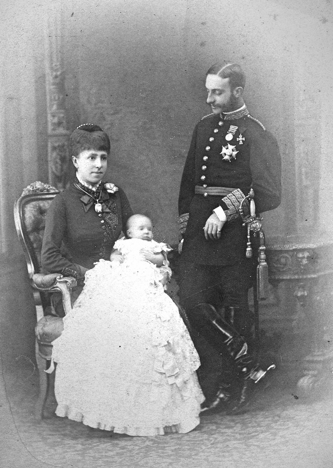 Retrato fotográfico de los reyes de España.